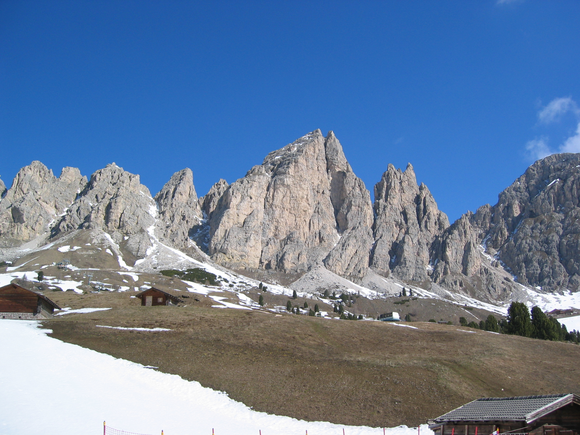 Cirspitzen vom Grödnerjoch aus.